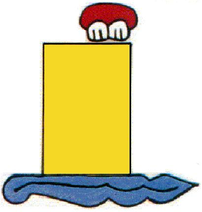 Escudo del municipio de Amacuzac, Morelitos .